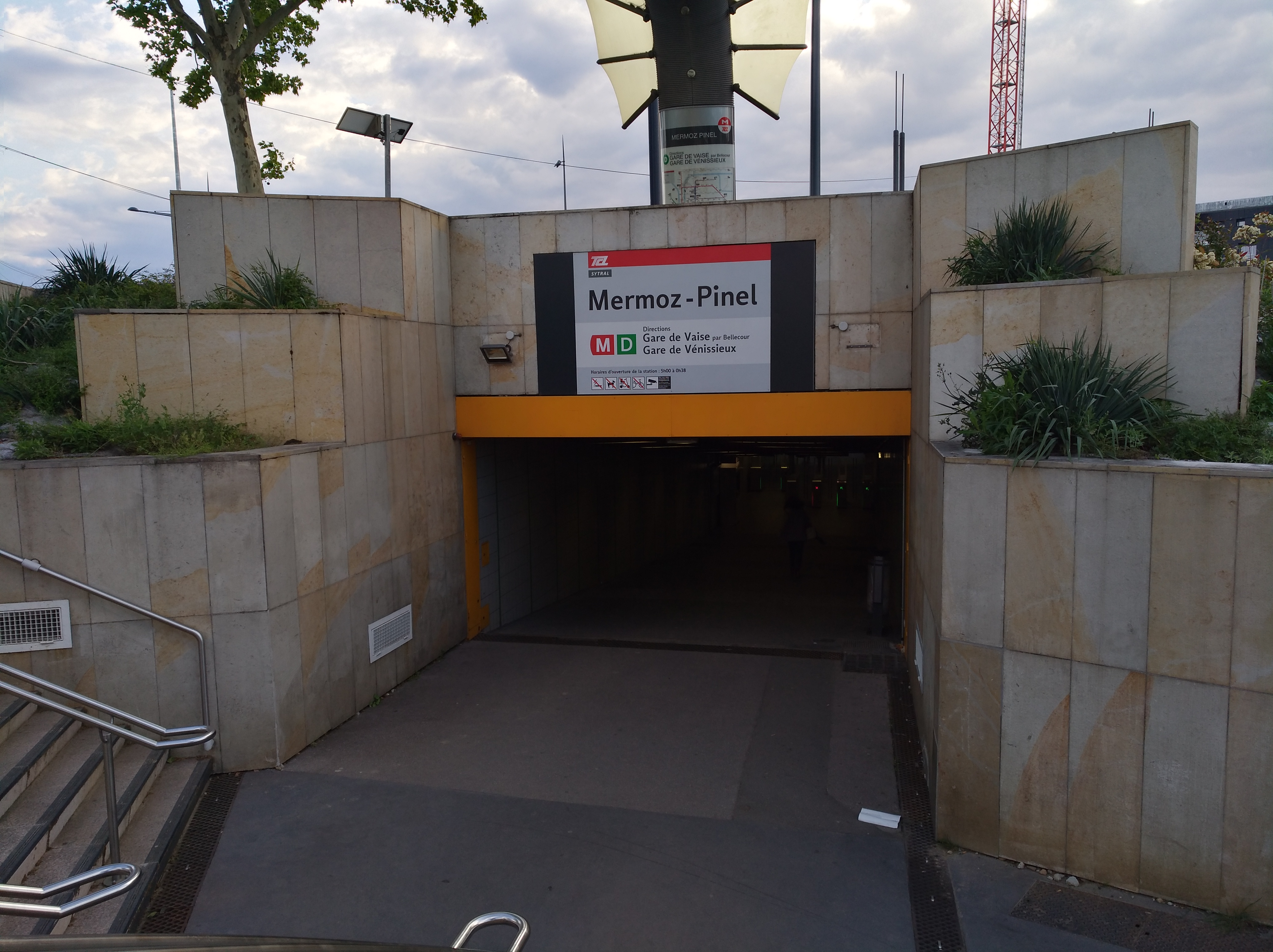 Entrée du métro Mermoz-Pinel (ligne D du métro de Lyon), côté Galeries Lafayette, à Bron.